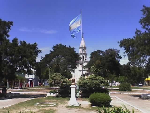 Church of Nuestra Señora de la Merced, Merlo, Buenos Aires Province, Argentina.